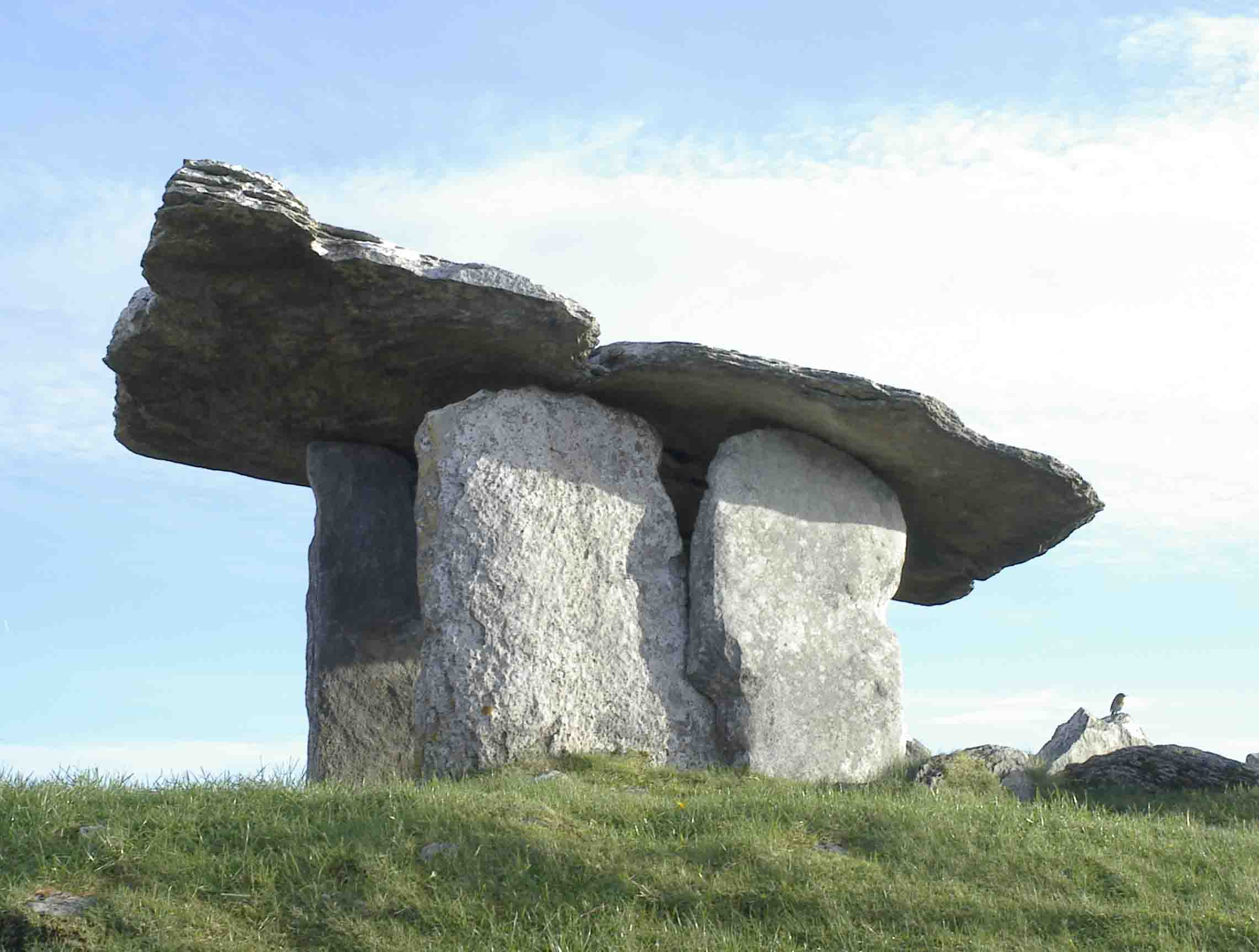 November 2005, Danny Burke